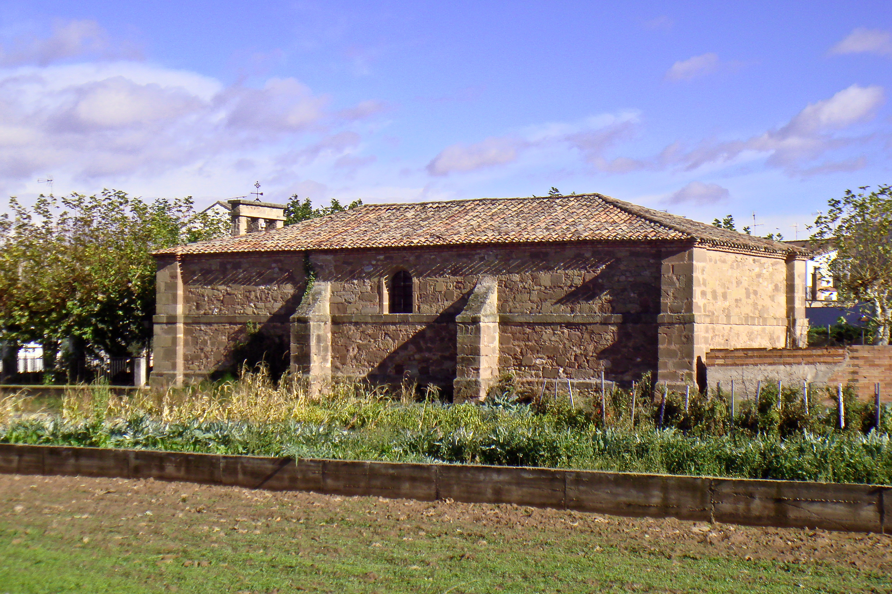 Ermita de San Pantaleón en la localidad de Huércanos, La Rioja - España